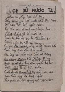 Trang thứ hai của cuốn sách "Lịch sử nước ta", do Việt Minh Tuyên truyền Bộ xuất bản lần đầu vào tháng 2 năm 1942, tại căn cứ Cao Bằng. Bài thơ "Lịch sử nước ta" gồm 208 câu thơ lục bát, được Nguyễn Ái Quốc (tức Hồ Chí Minh) viết tay vào cuối năm 1941.